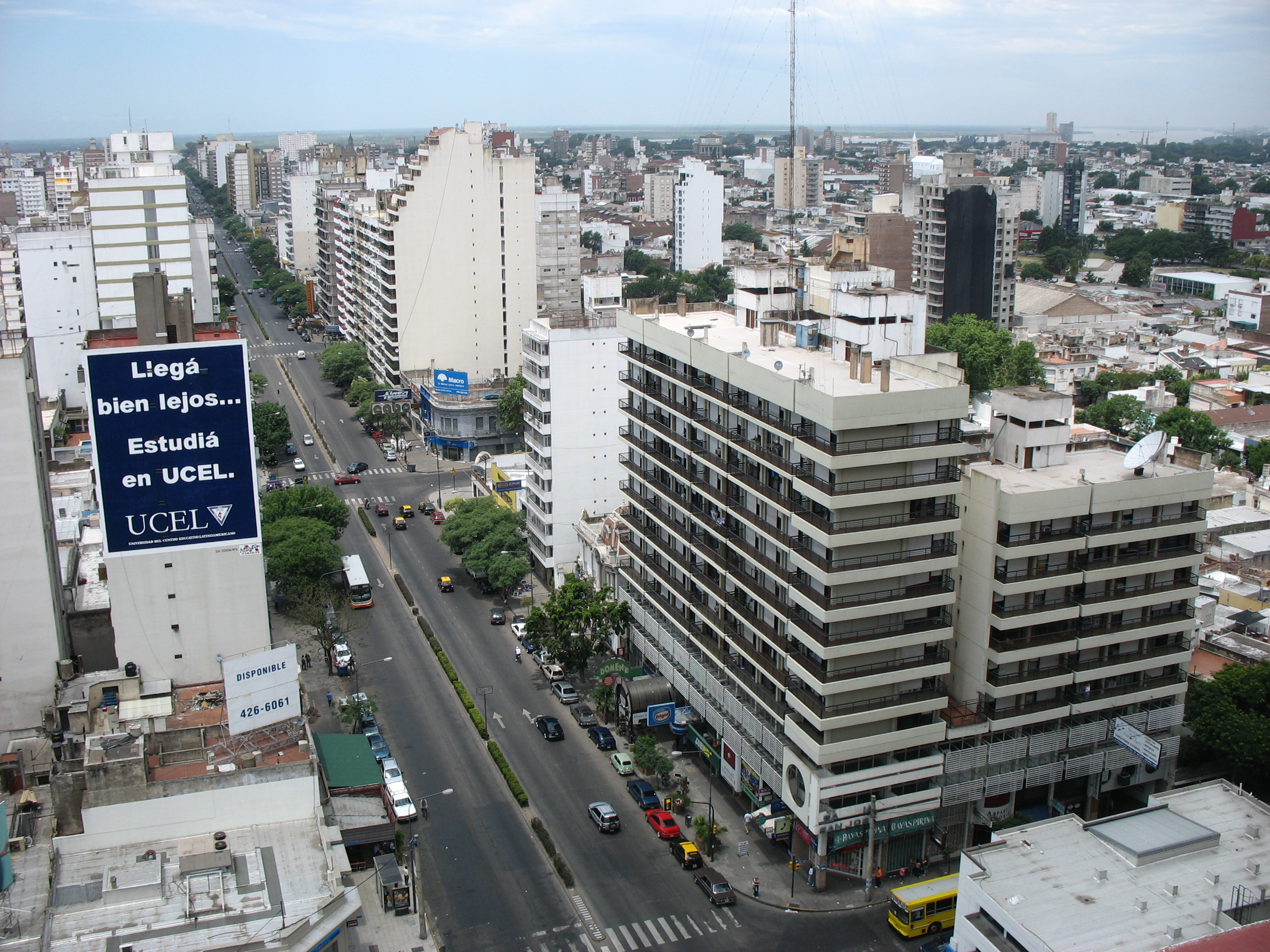 Pellegrini Avenue. Rosario, Argentina.